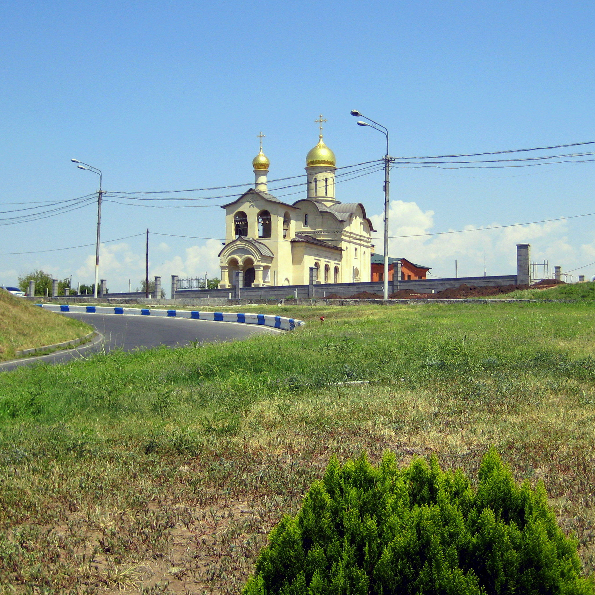 Новая православная церковь построенная в2016году в городе Ереване